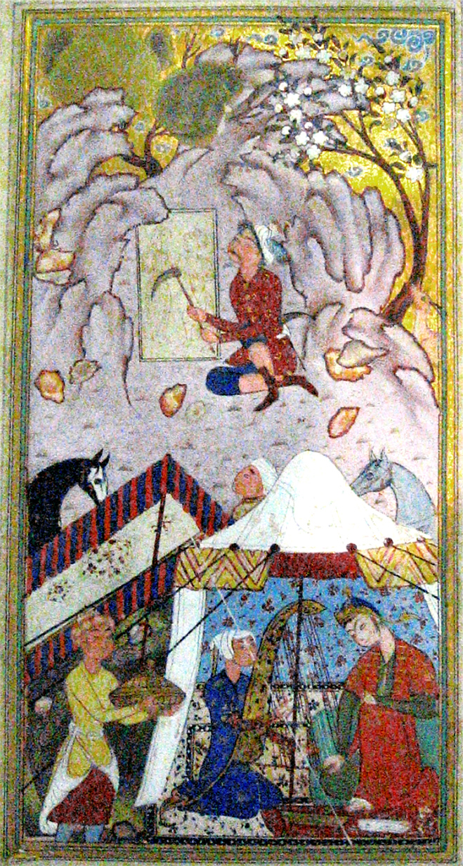 Miniature Shirin et Farhad de Vahshi Bâfqi, Nastaliq, non signé, 1588. National Iran Museum, Tehran.